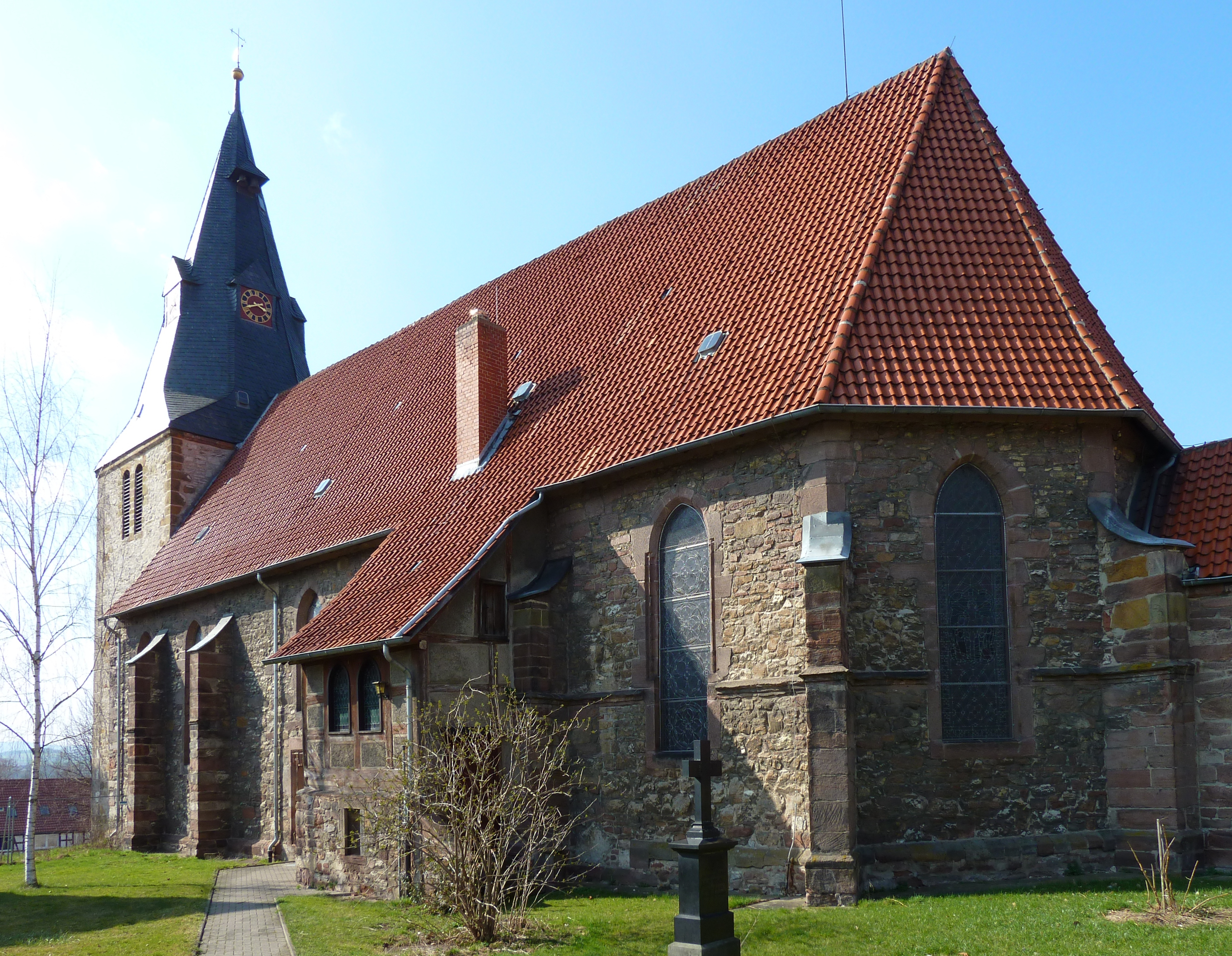 Ev.-luth. Kirche St. Martini in Hohnstedt, Stadt Northeim, Niedersachsen